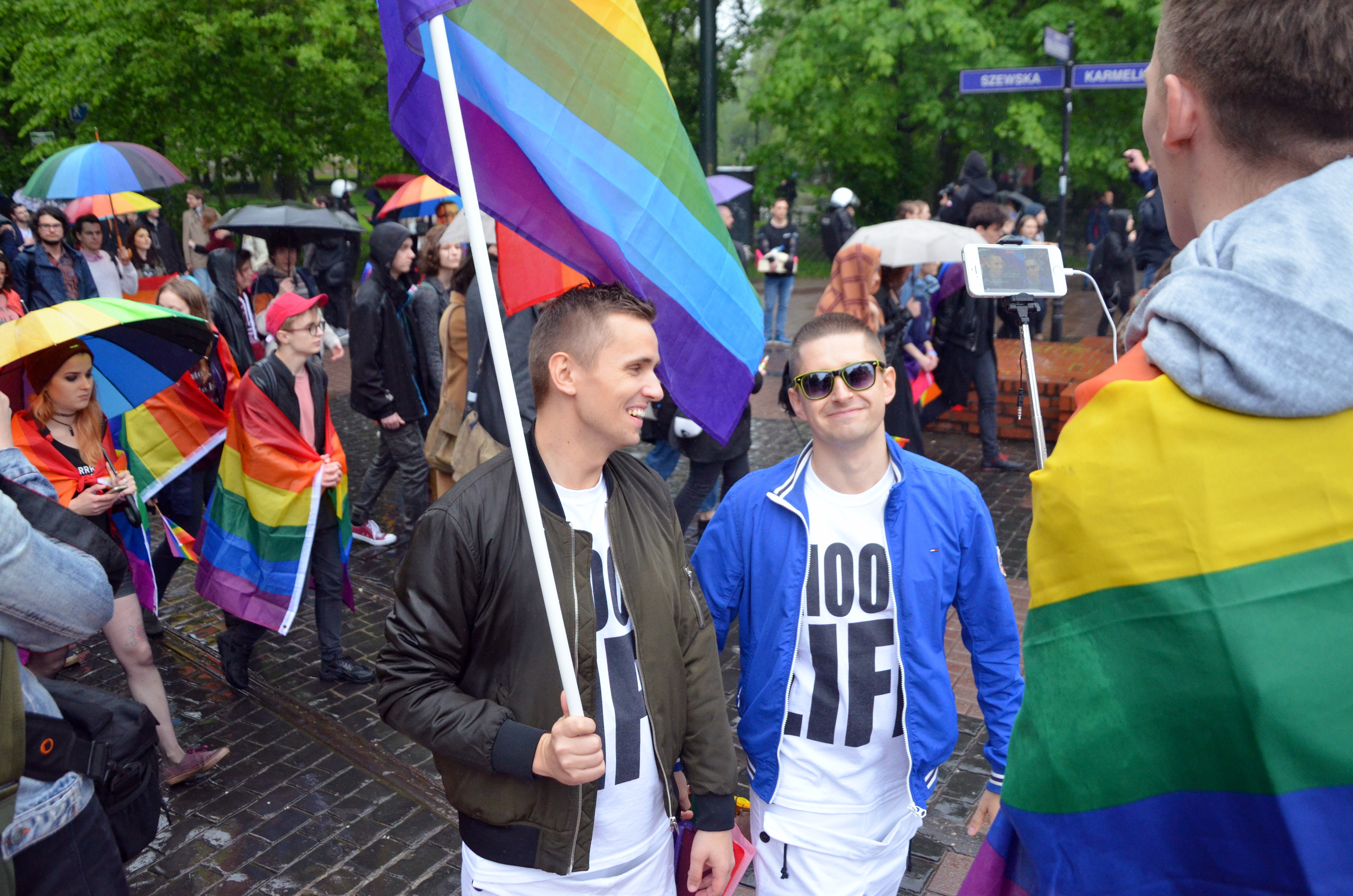 Das Queer Mai Festival, die Kultur der LGBTQI in Krakau